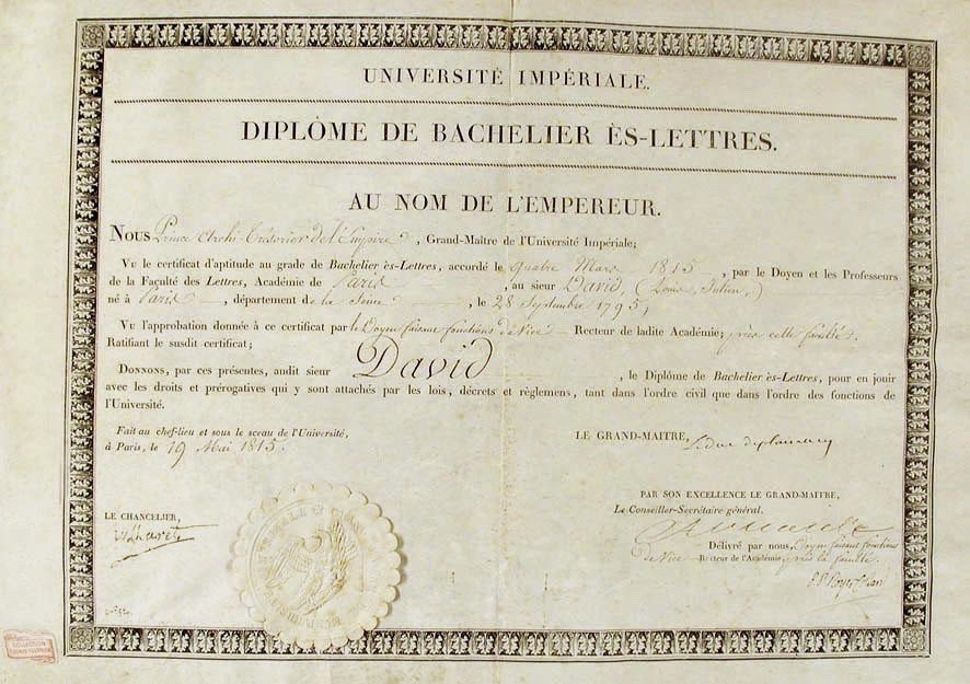 Diplôme